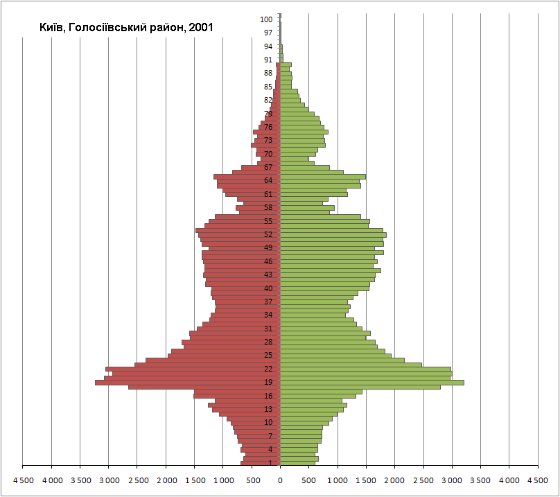 Статево-вікова піраміда населення Голосіївського району Києва за переписом 2001 р.